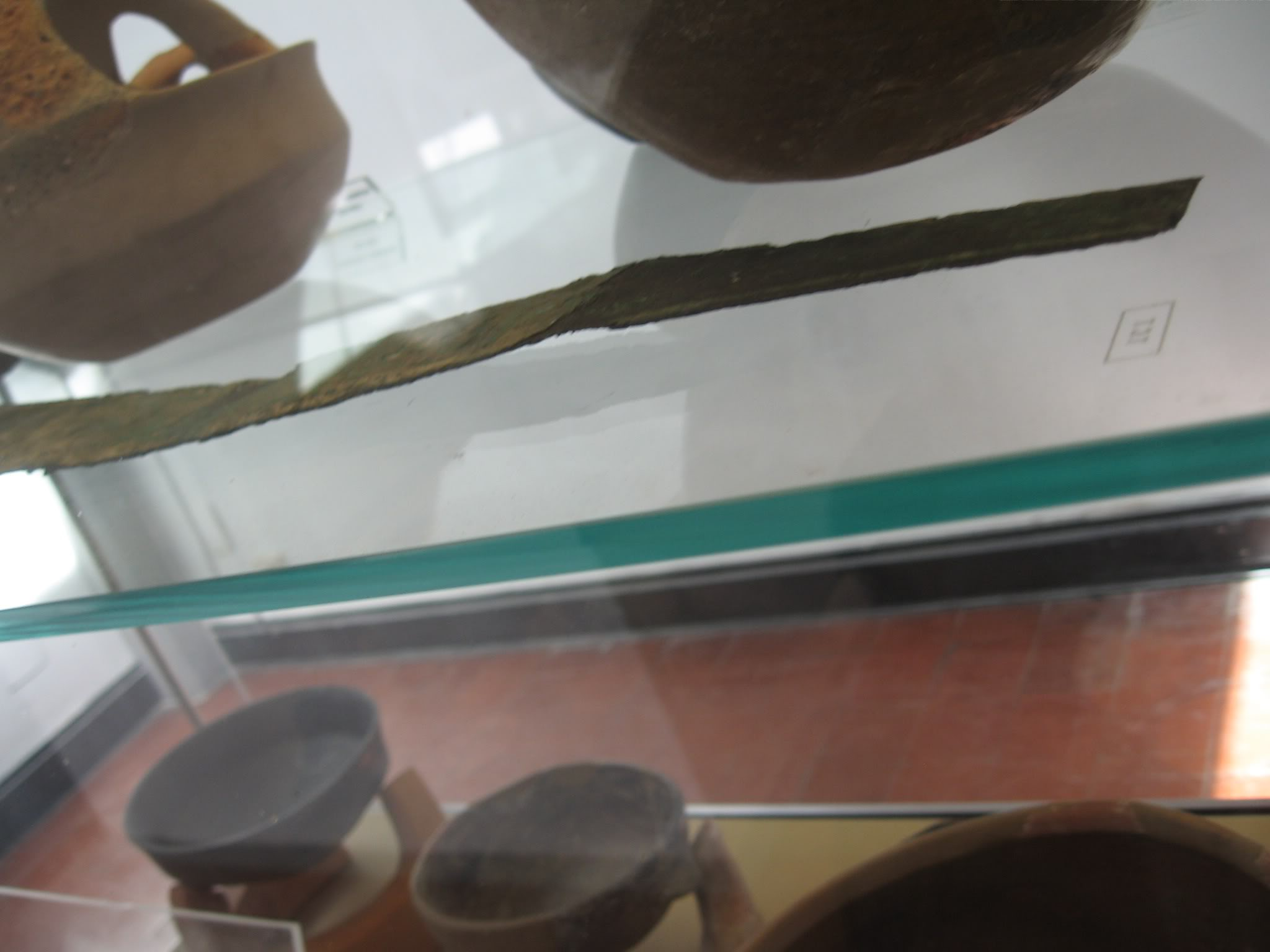 Spada tipo Sant'Iroxi, cultura di Bonnanaro, da Maracalagonis. Museo nazionale archeologico ed etnografico G. A. Sanna